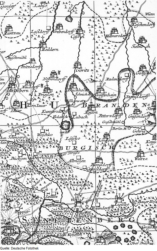 Original image description from the Deutsche Fotothek Senftenberg. Karte des Amtes Senftenberg, von Schenk, 1757 (Sign.: VII 105)